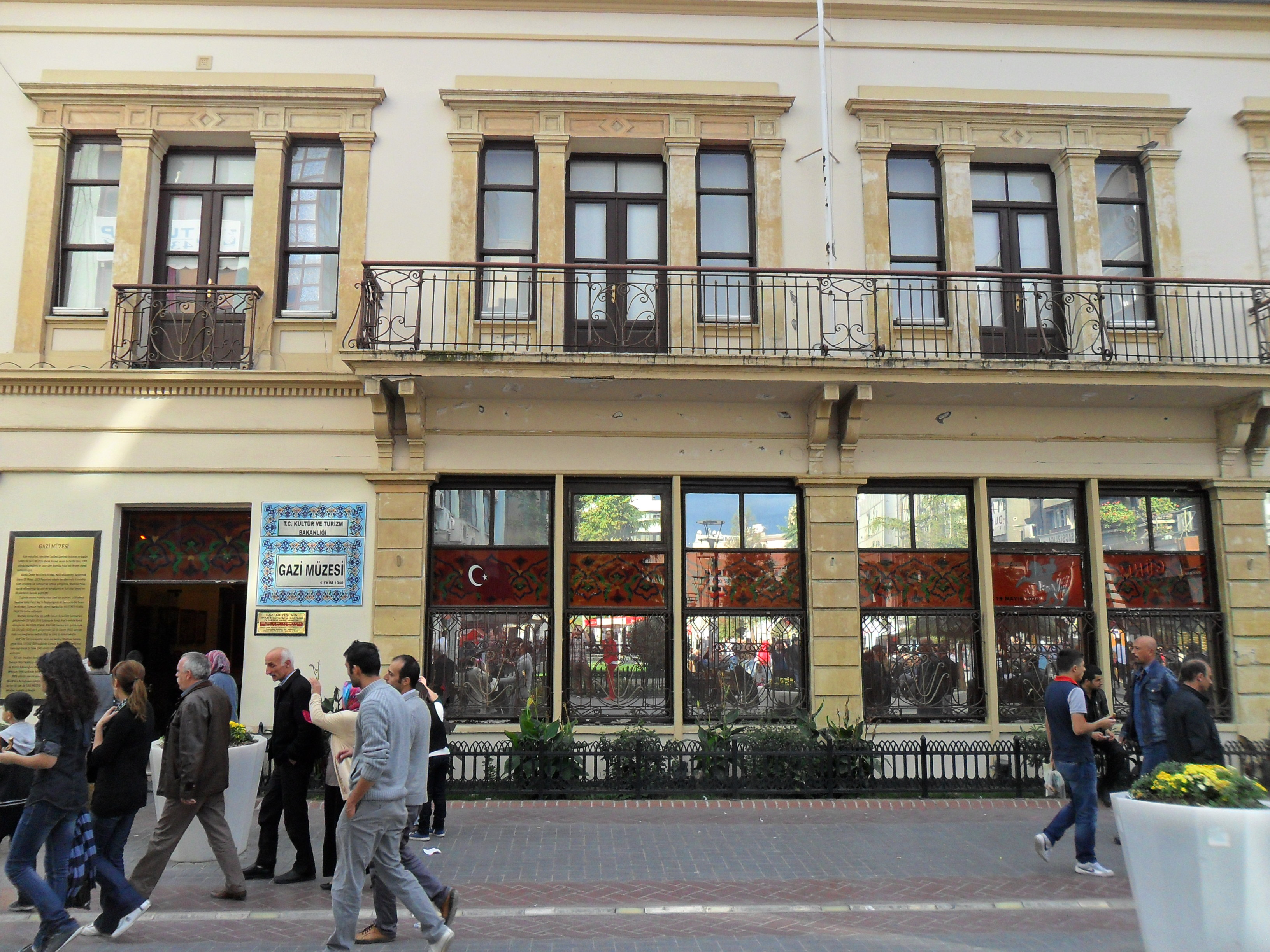 Gazi Müzesi'nin cepheden görünümü.